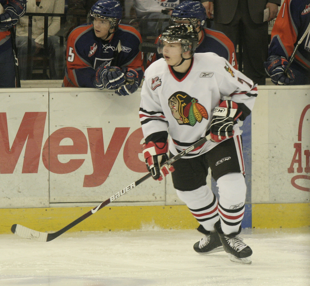 Daniel Johnston, Portland Winter Hawks